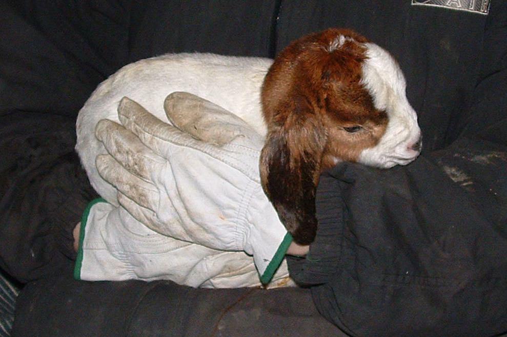 A newborn Boer goat doe.